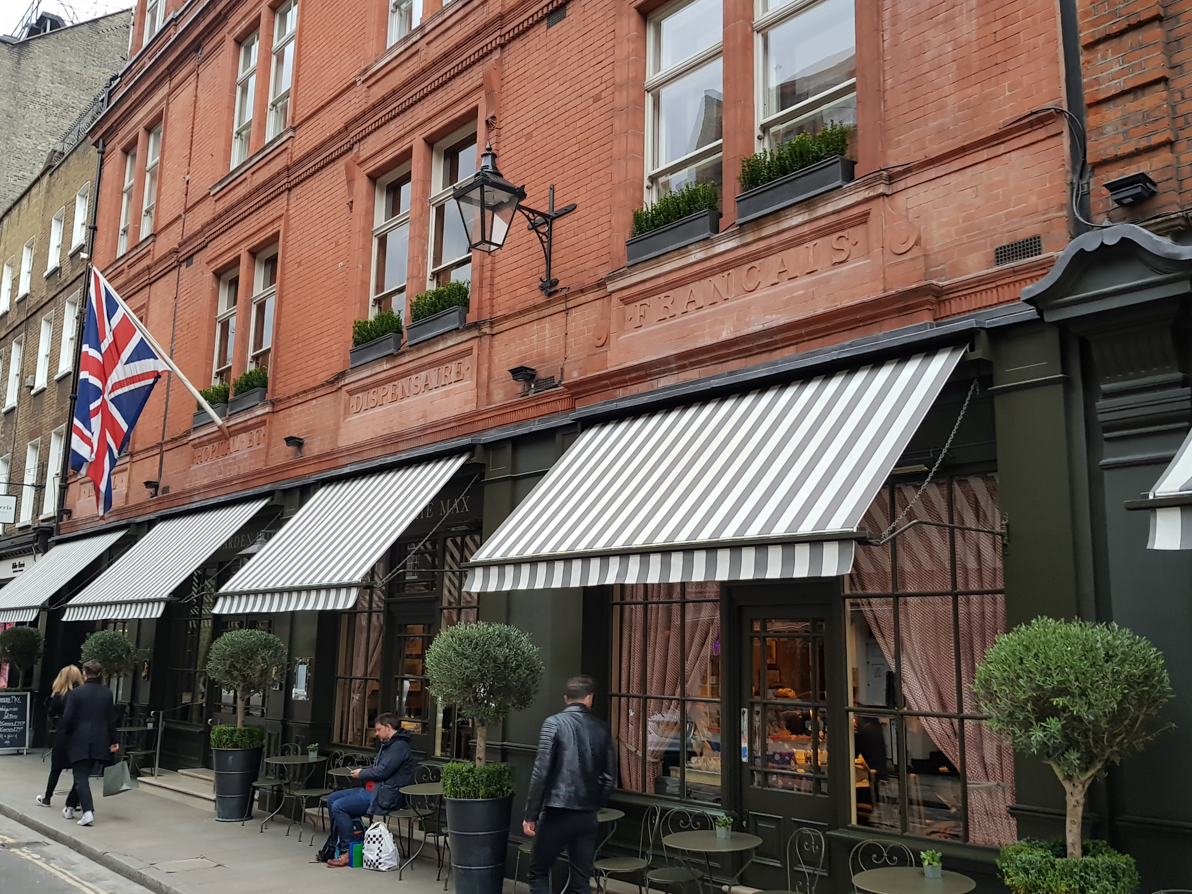 Hôtel "The Covent Garden", 10 Monmouth Street, Londres. Le bâtiment porte l'inscription "NOUVEL HOPITAL ET DISPENSAIRE FRANCAIS".